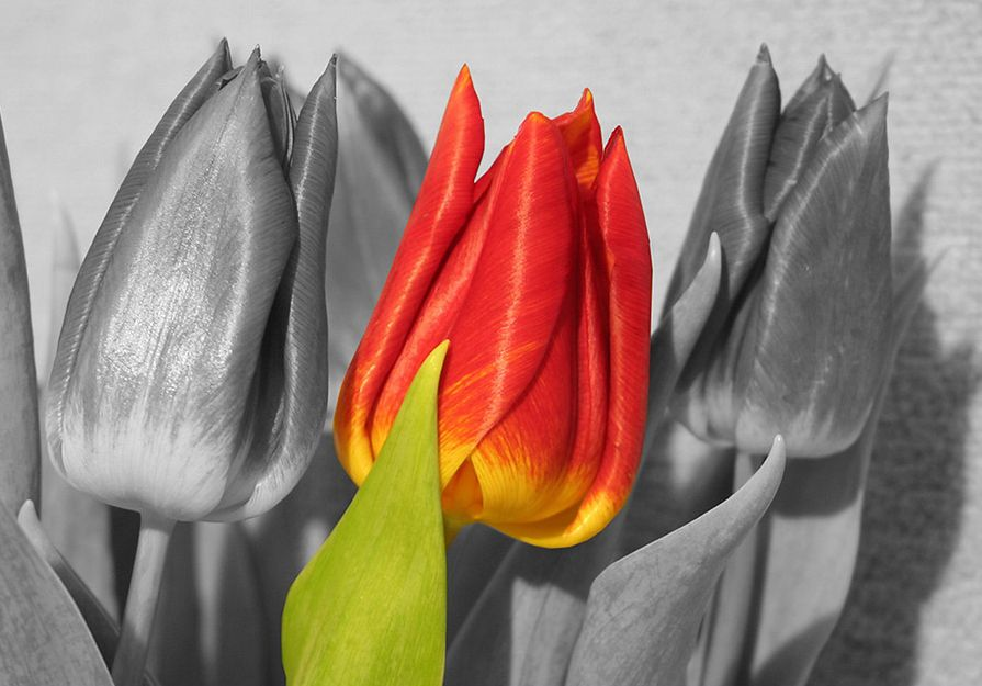 Tulpe in Farbe zurückversetzt. Autor meine Mutti.